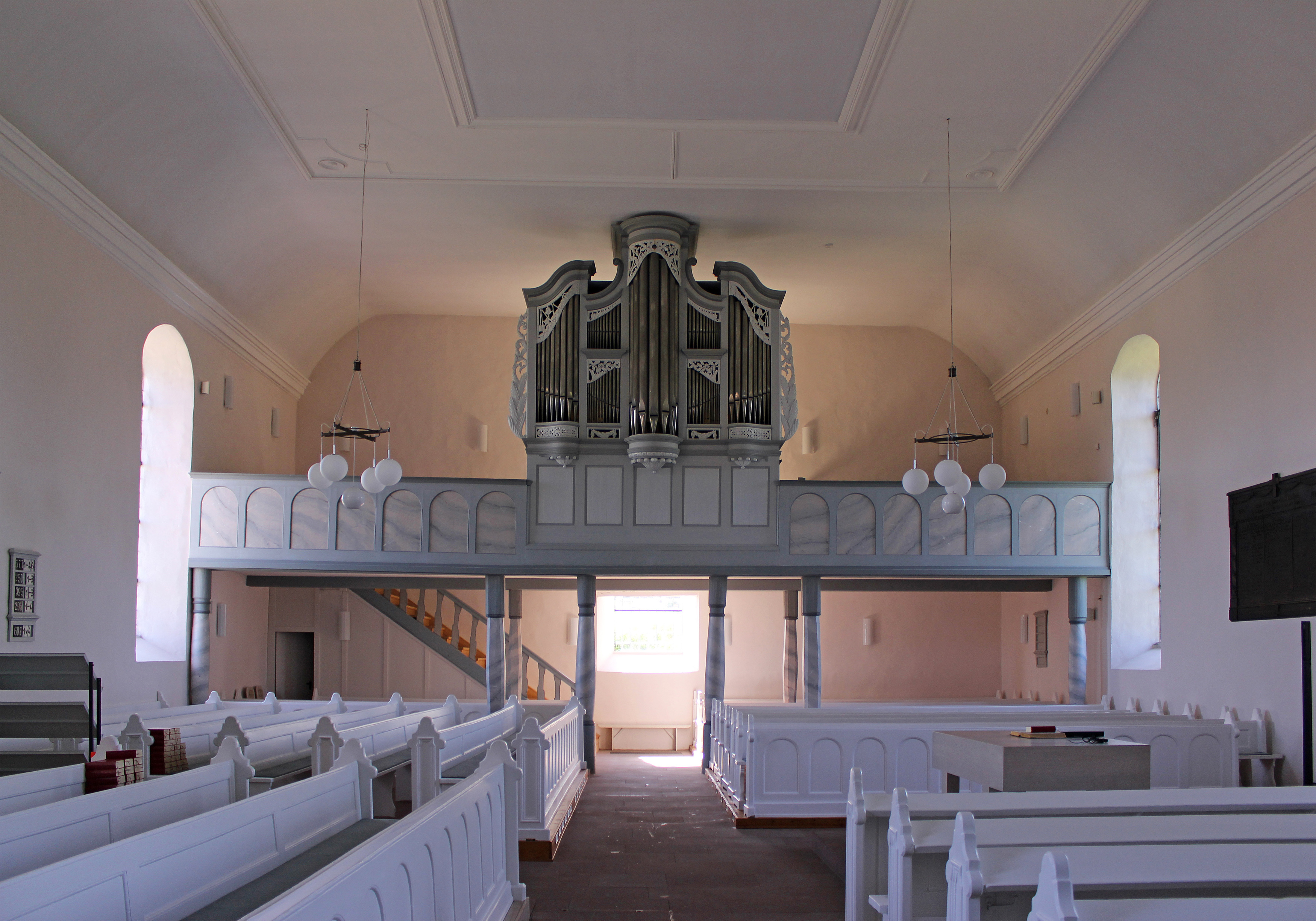 Innenraum der evangelischen Kirche in Wolfersweiler, Gemeinde Nohfelden, Landkreis St. Wendel, Saarland